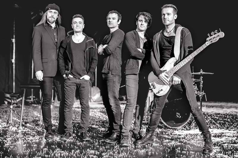 Okean Elzy v roce 2016